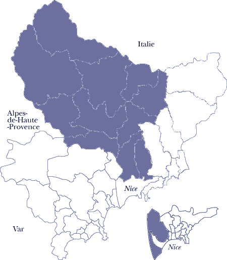 Carte de la 5e circonscription des Alpes-Maritimes issue du découpage de 1986 (en vigueur de 1988 à 2007). Cette carte est issue du site du conseil général de ce département, et retravaillée par mes soins.